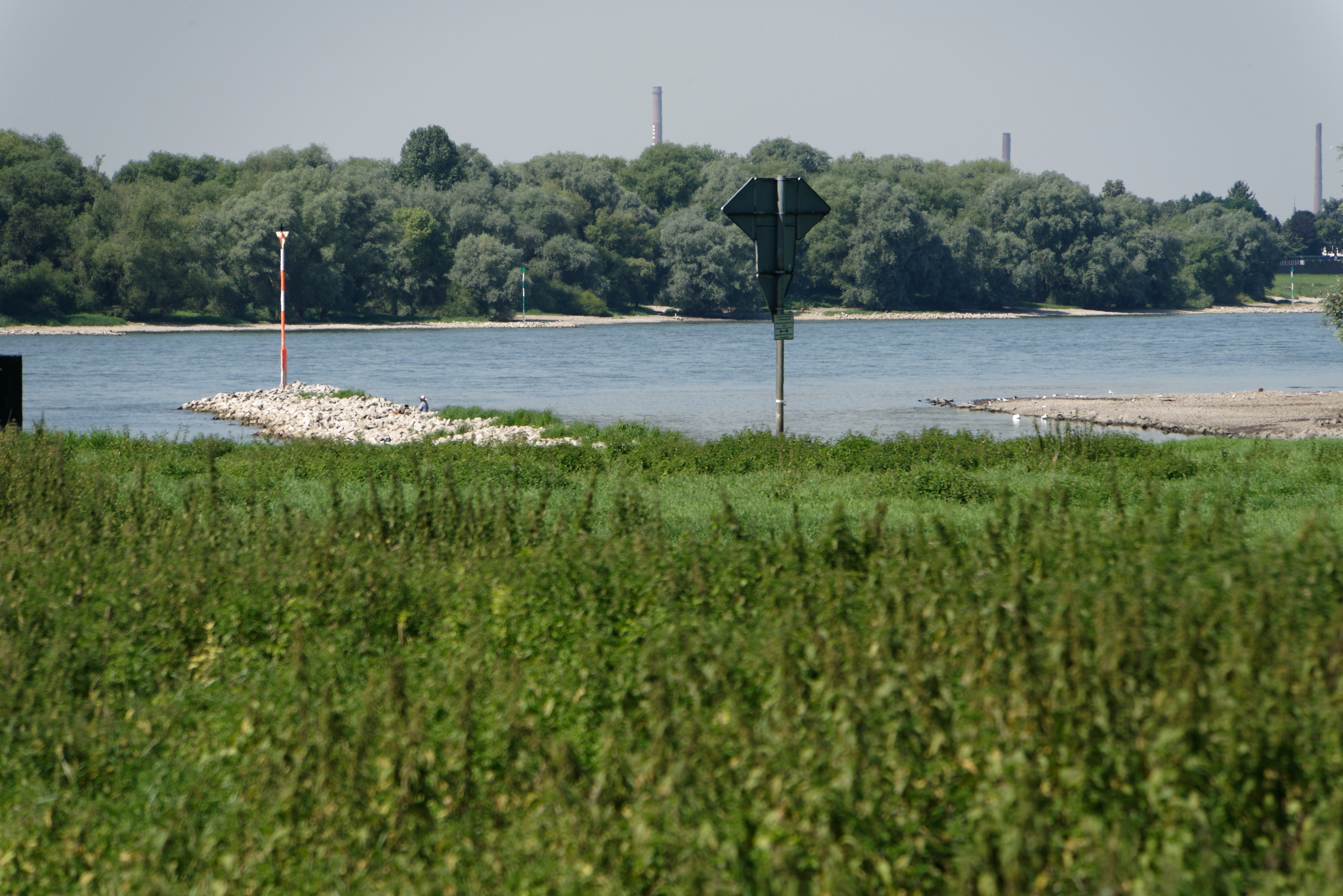 Wuppermündung